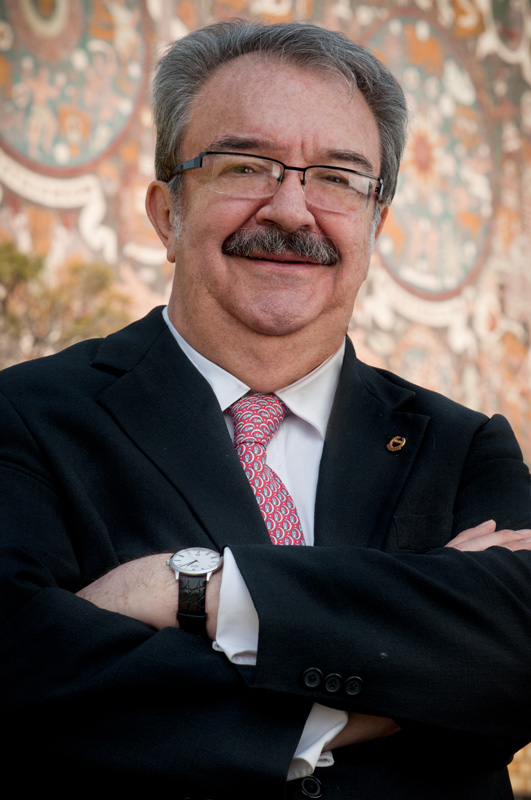 Fernando Serrano Migallón